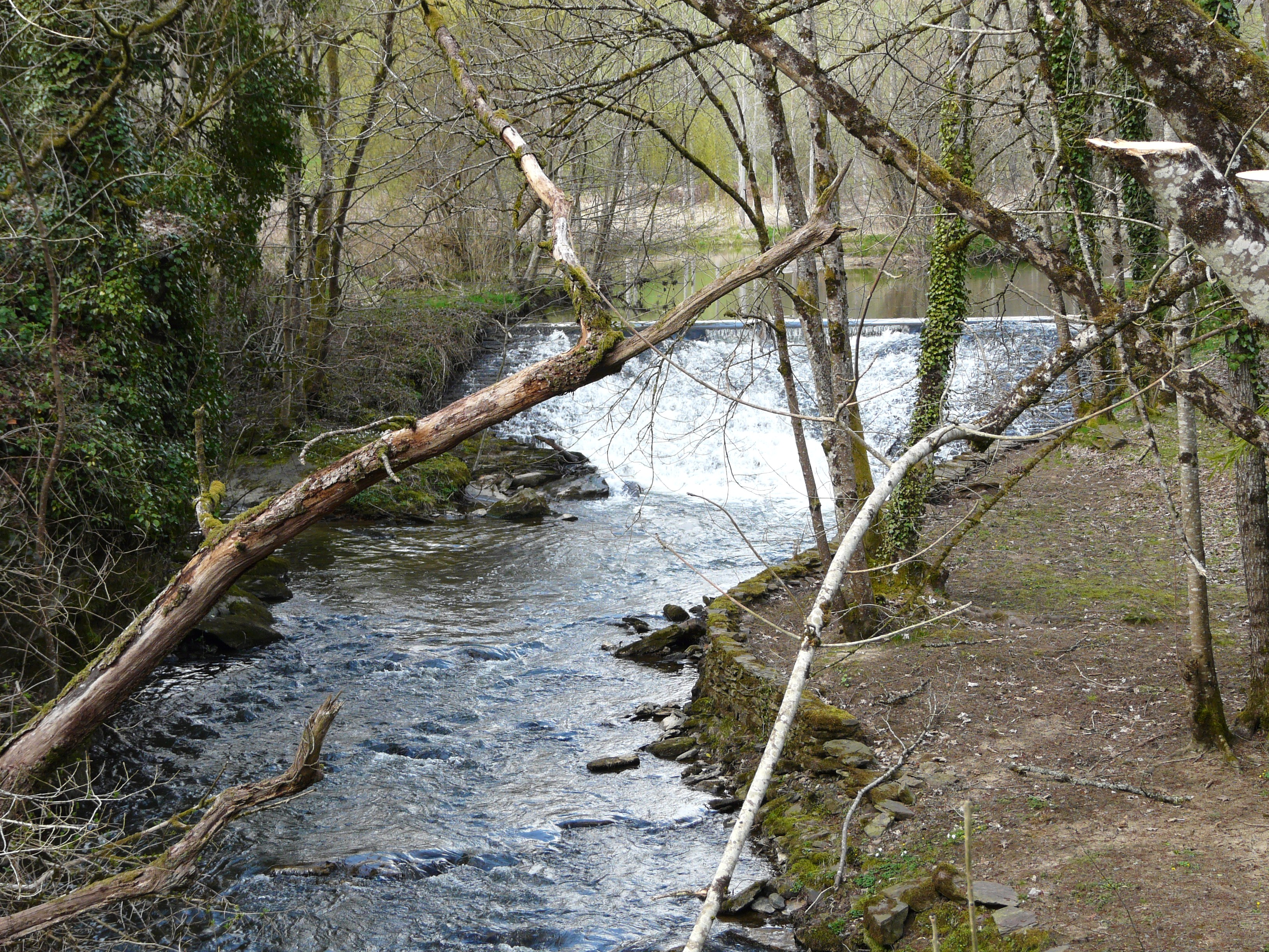 La rivière la Loue au moulin de Beausoleil, marque la limite entre Sarlande (à gauche) et Angoisse (à droite), Dordogne, France. Vue vers l'amont.